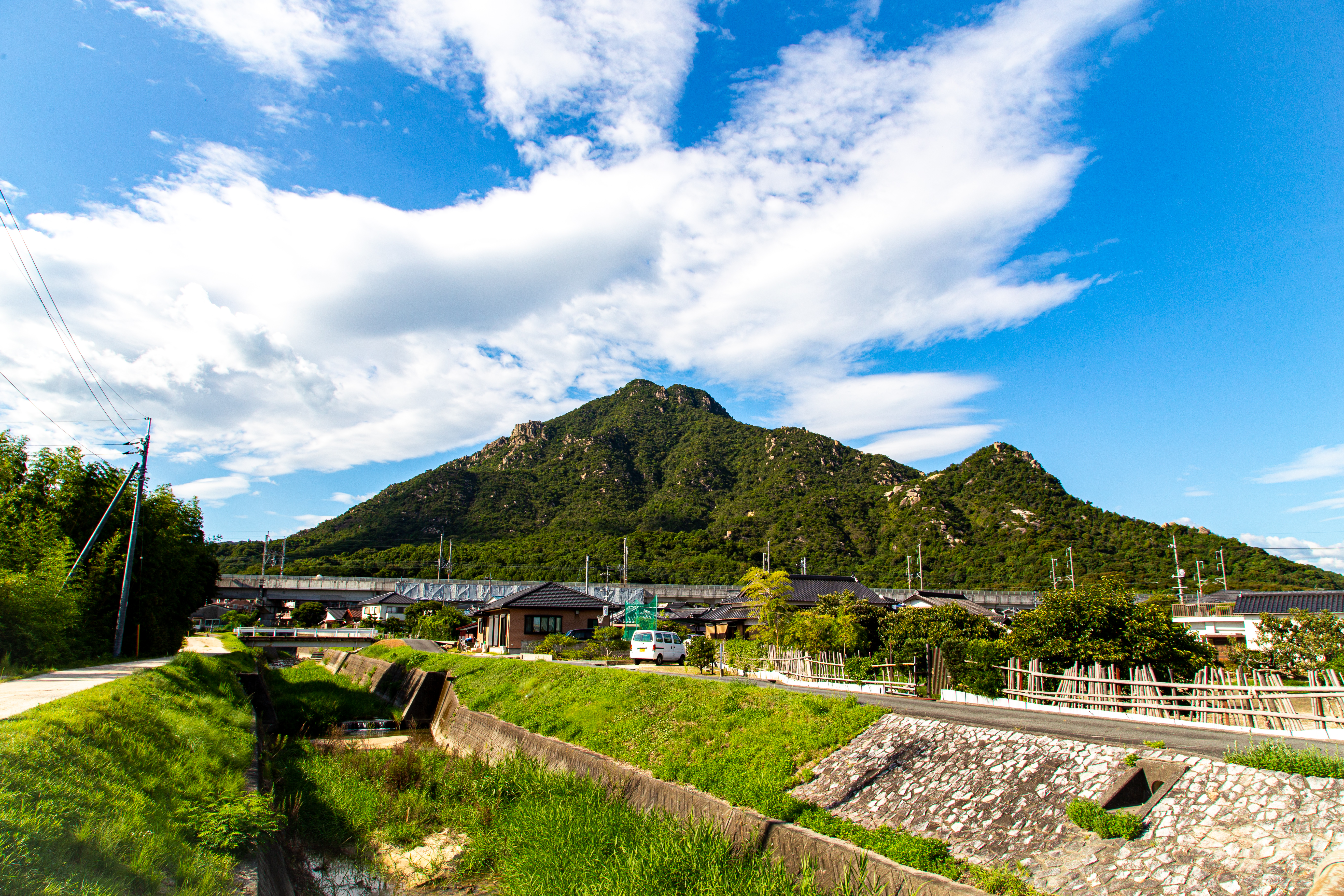 山口県防府市右田の右田ヶ岳、山は中世には城があり、右田ヶ岳城と呼ばれていた。